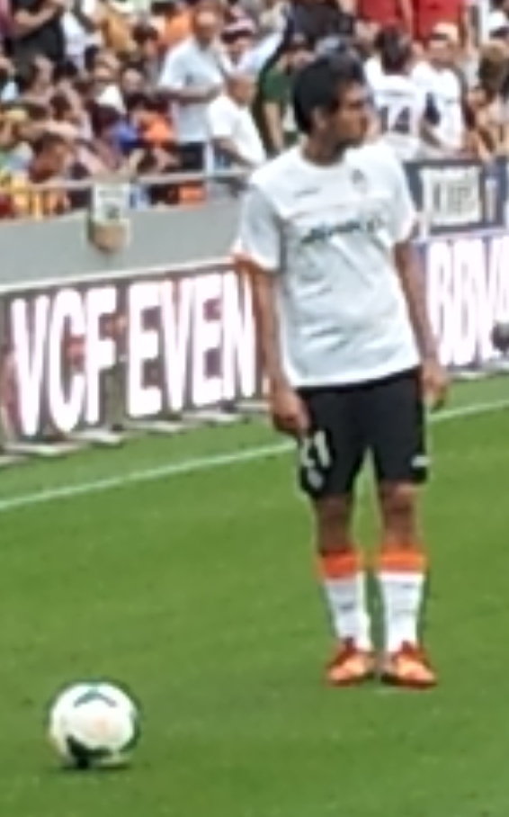 Dani Parejo, entrenant a Mestalla abans d'un partit.